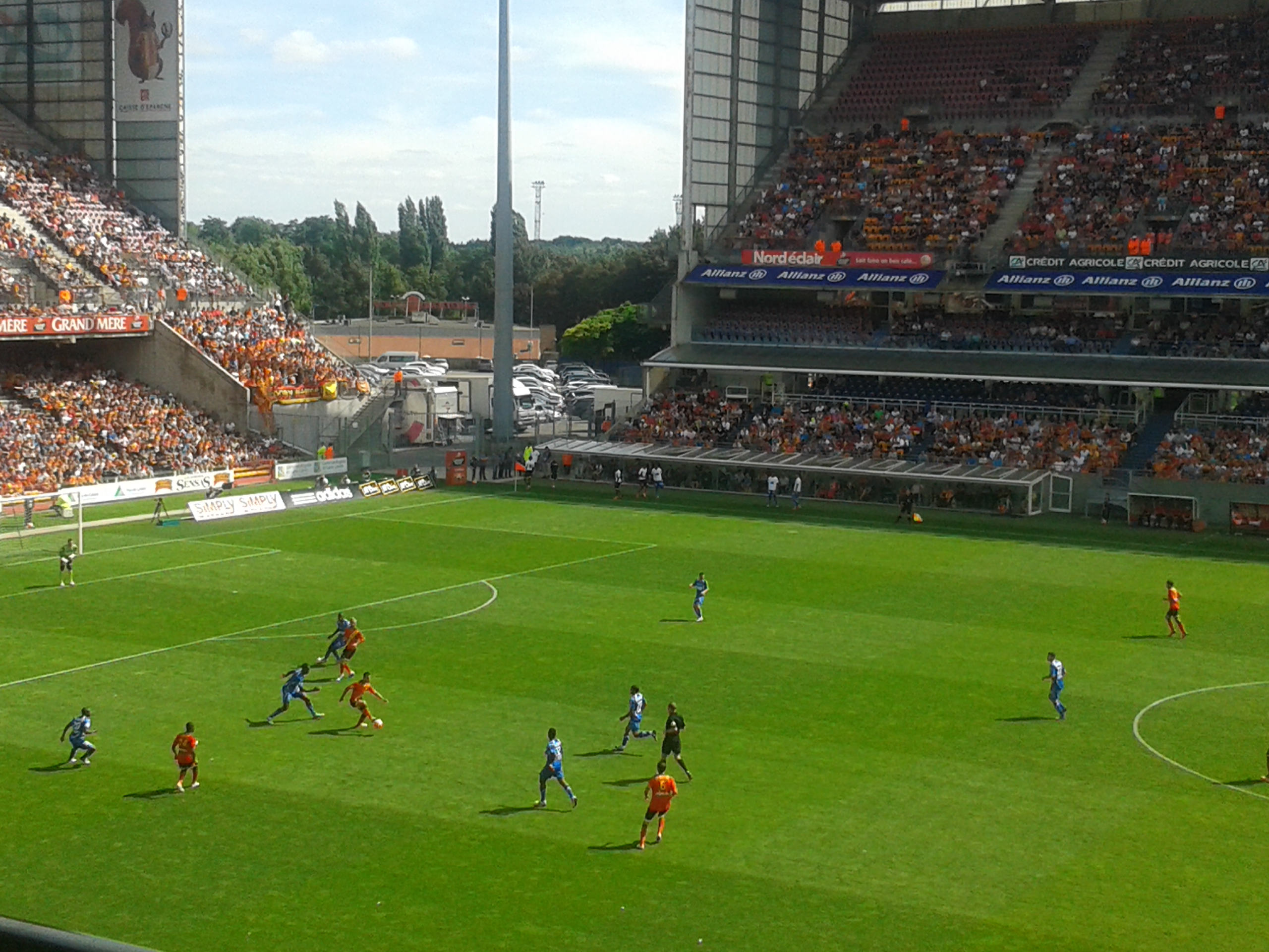 RC Lens - AJ Auxerre, le 17 août 2013, au Stade Bollaert-Delelis, pour le championnat de France de football de Ligue 2 (deuxième division française).